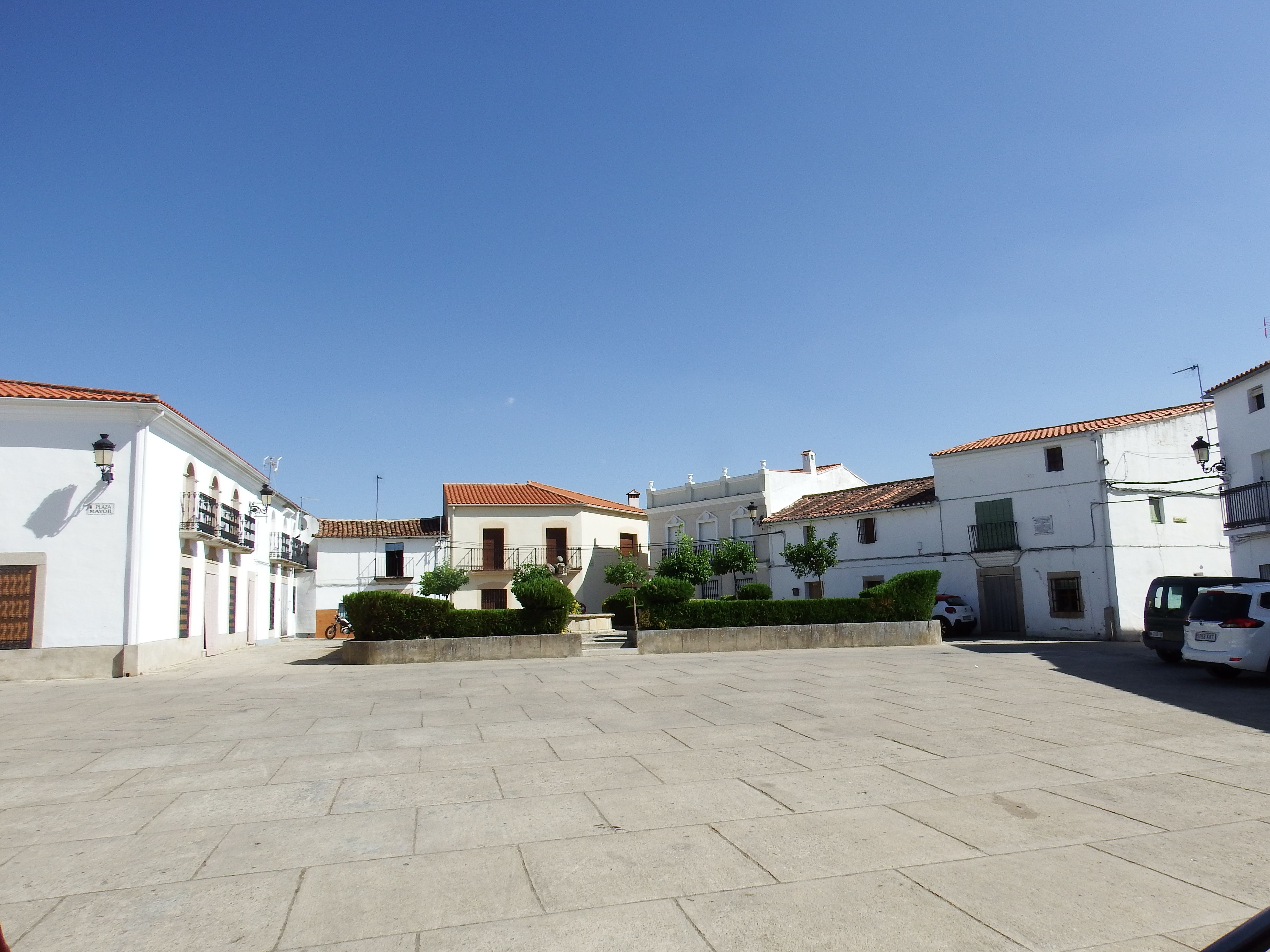 Albalá, Cáceres